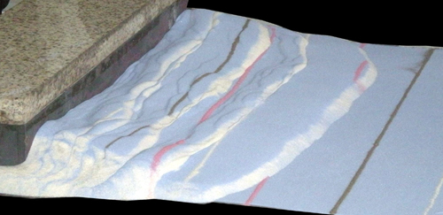 Compression d'une structure fragile pouvant représenter la croute continentale.